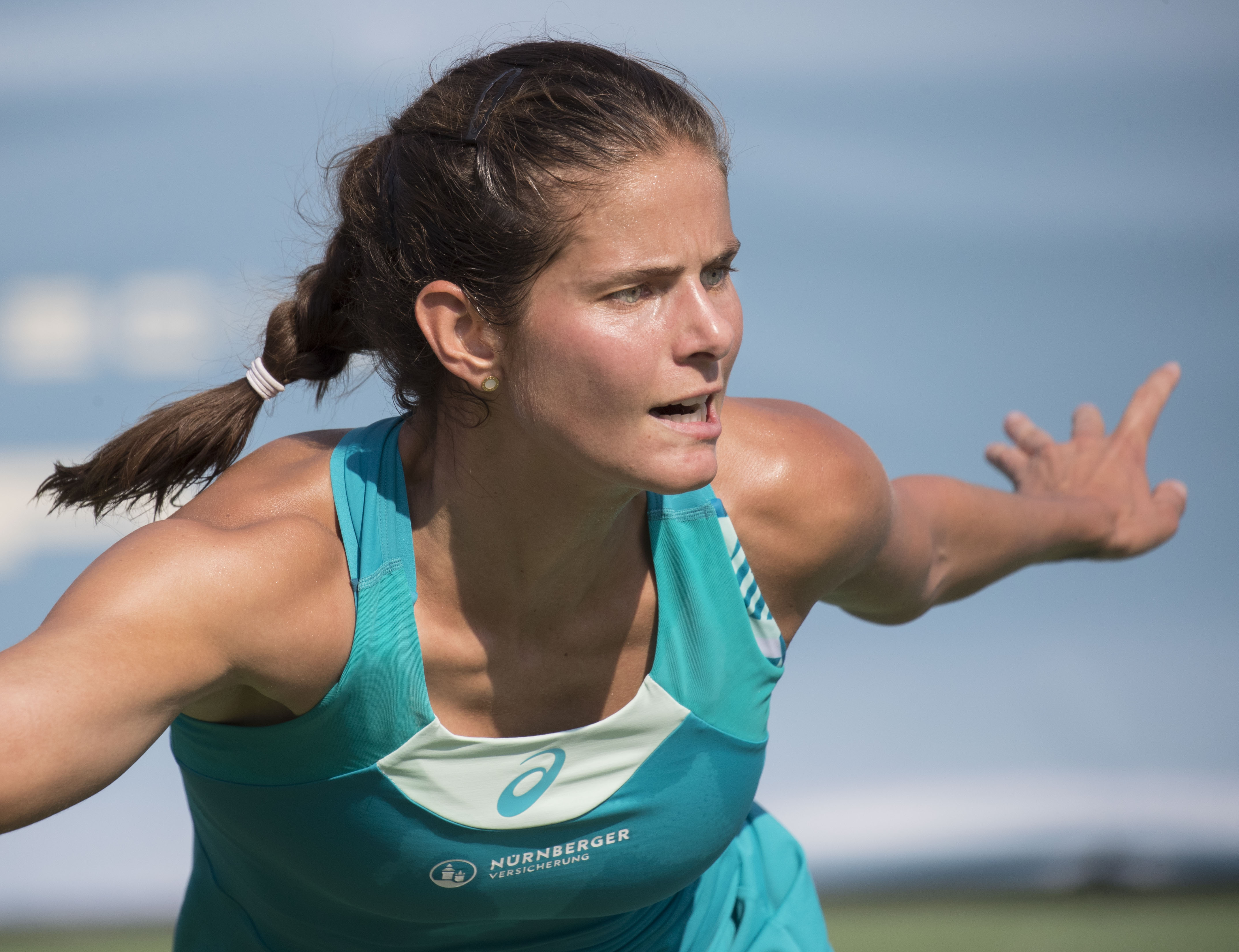 Citi Open Tennis 2017